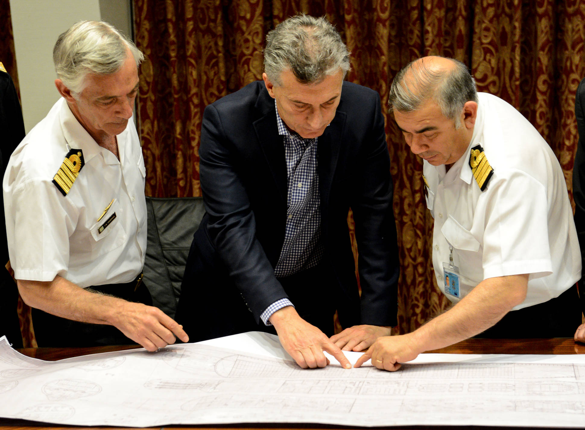 El presidente de Argentina Mauricio Macri en el edificio Libertad (Comando de la Armada Argentina). Rodean al presidente dos capitanes de navío submarinistas. Los tres funcionarios revisan en un mapa la situación del submarino ARA San Juan (S-42), que se encontraba desaparecido.